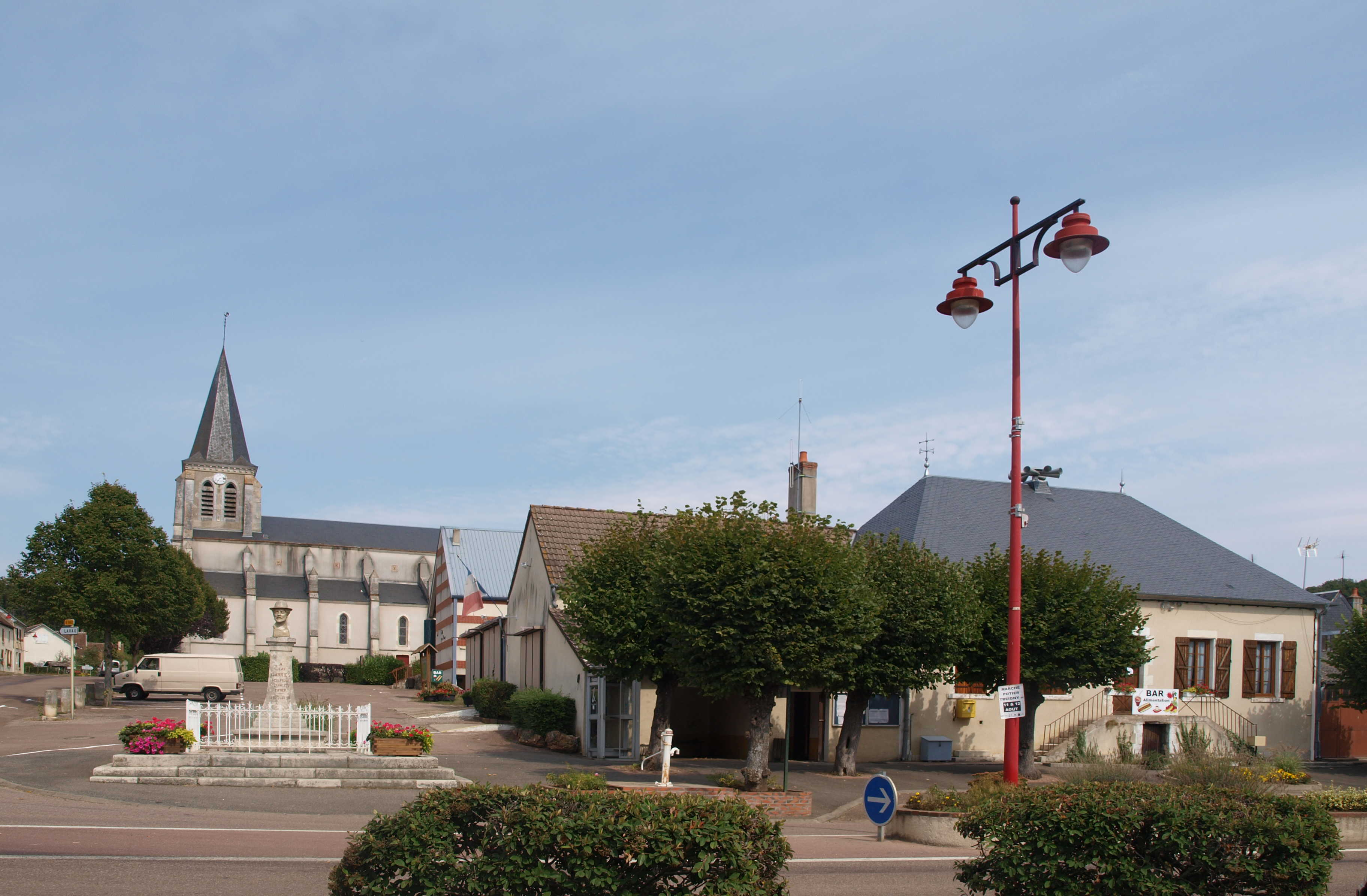 Arquian (Nièvre) ; la place